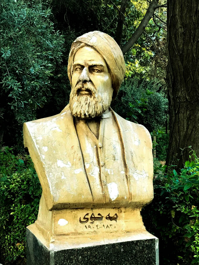 کوردی: پەیکەری مەحوی لە باخی گشتی لە سلێمانی